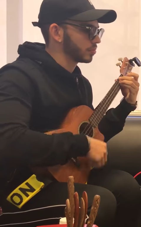 Entrevista a Julian Turizo hermano,musico y compositor de Manuel Turizo